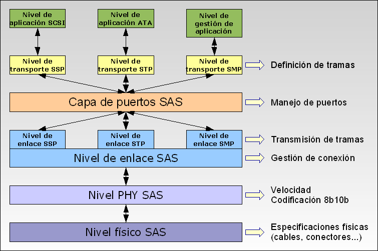 Distribucion de niveles SAS